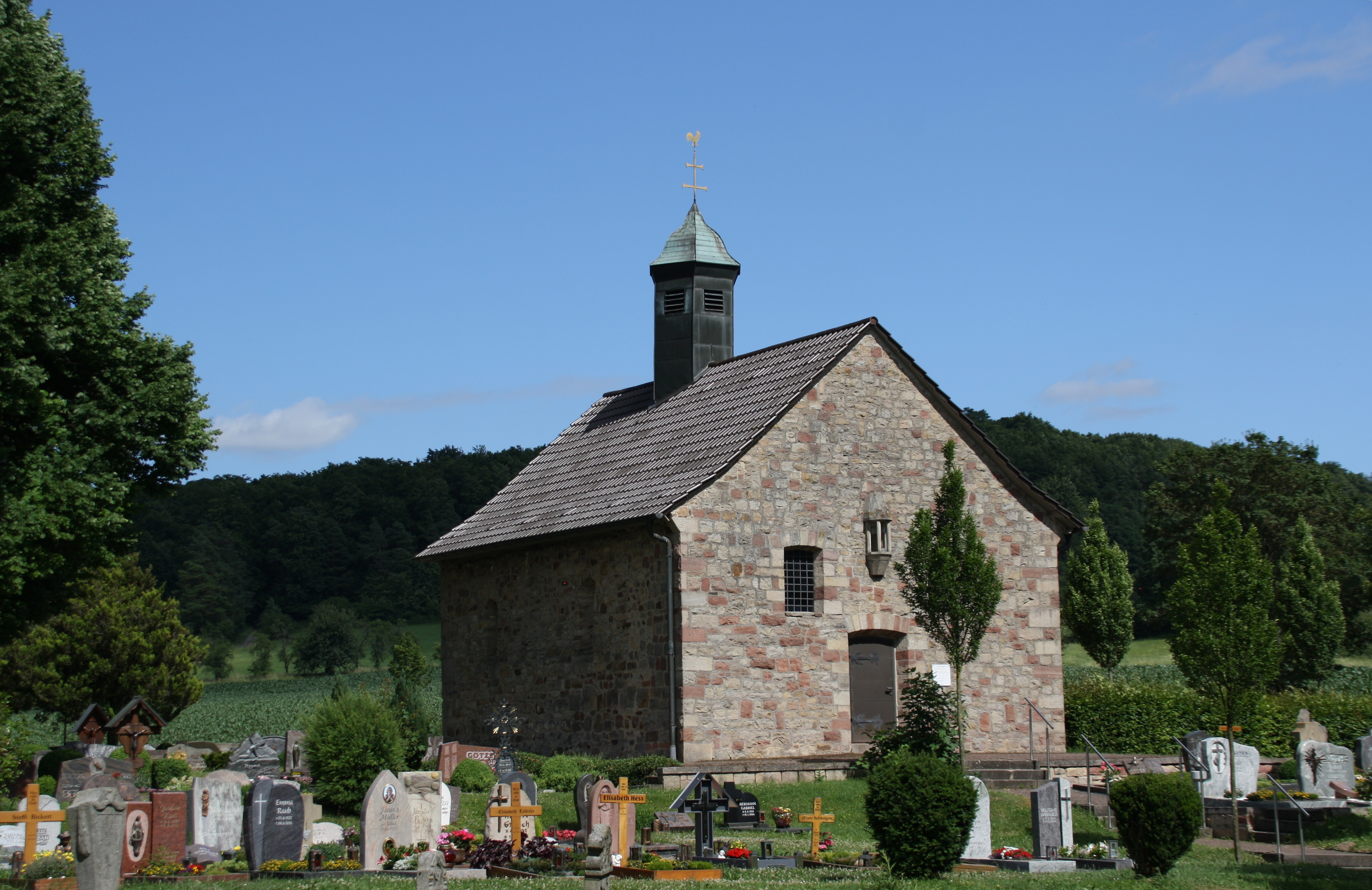 Weißenborn-Kapelle mit Friedhof bei Mackenzell, Stadt Hünfeld, Kreis Fulda